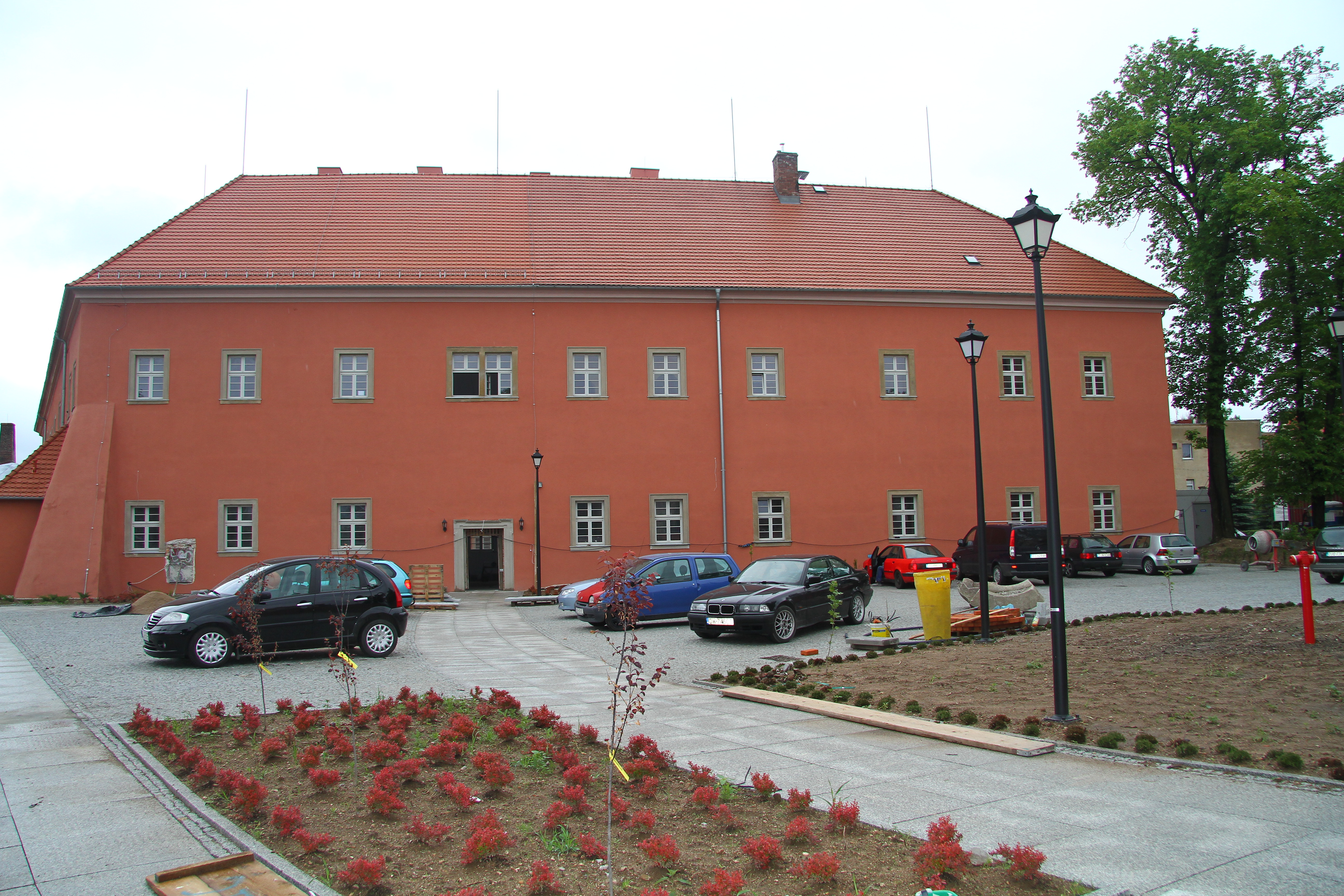 Zdjęcie prezentujące wejście do Muzeum Przyrodniczego